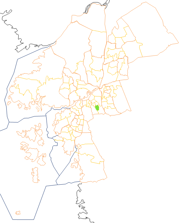 Karta som visar primärområdes belägenhet i Göteborg